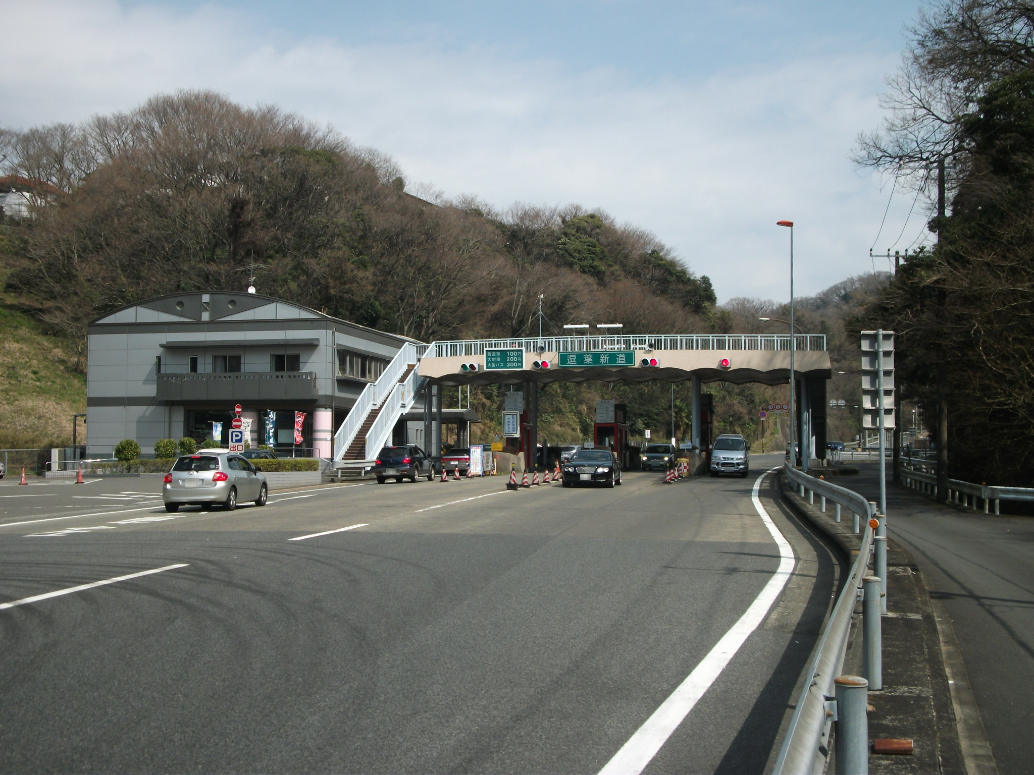 神奈川県葉山町、逗葉新道料金所・パーキングエリア。奥が逗子インター方面。